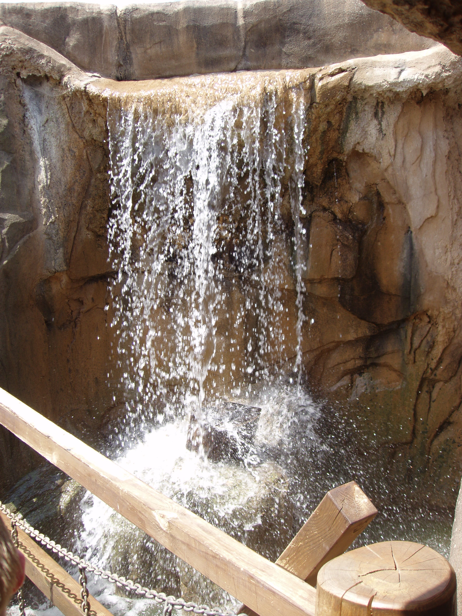 Dinópolis. Cascada de cartón piedra